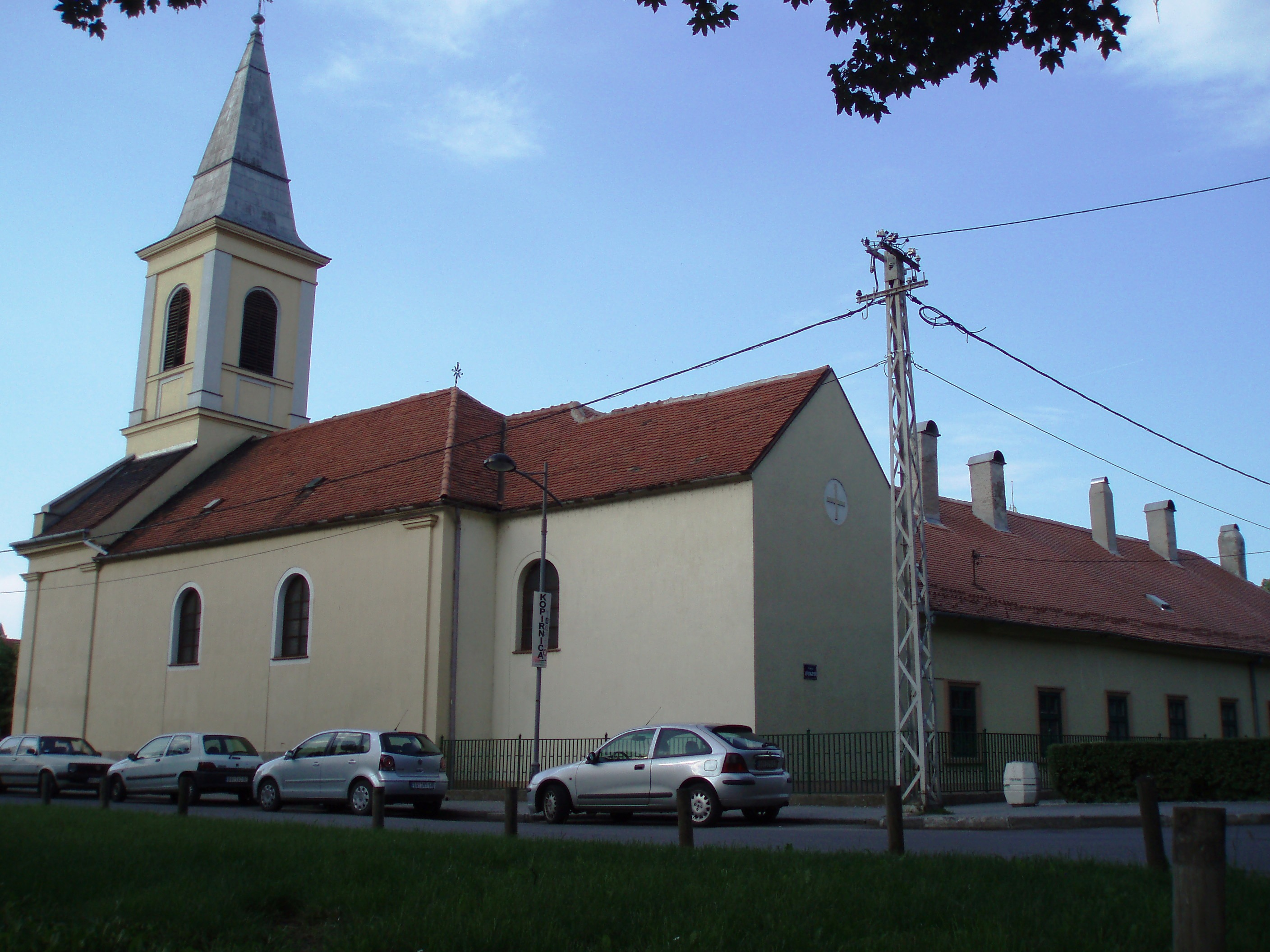 Фрањевачки самостан у Земуну - Црква са резиденцијом, аутор:Nicolo